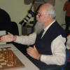 (Original text: Maarten Etmans)